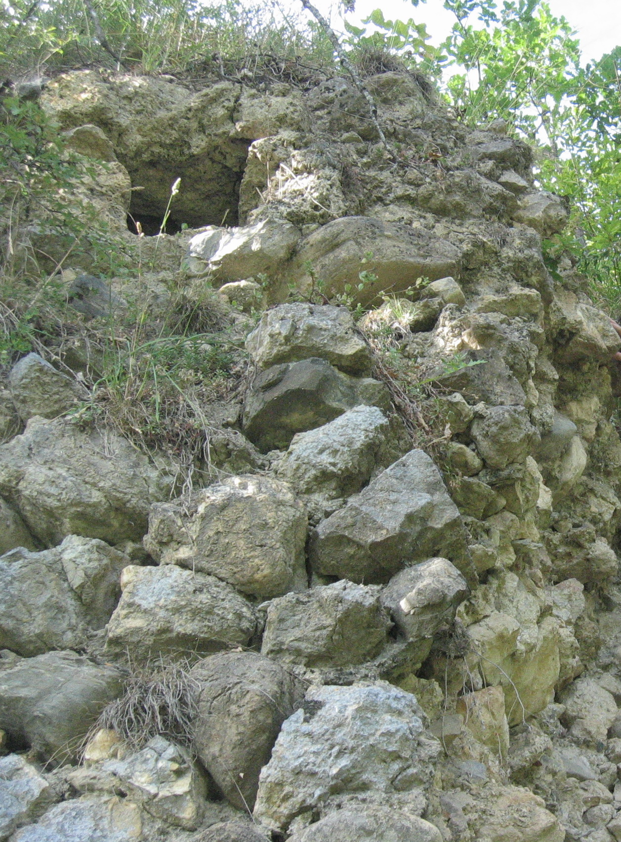 Un pan de mur du castrum avec une canonnière (aménagée par les troupes royales au XIVème siècle).